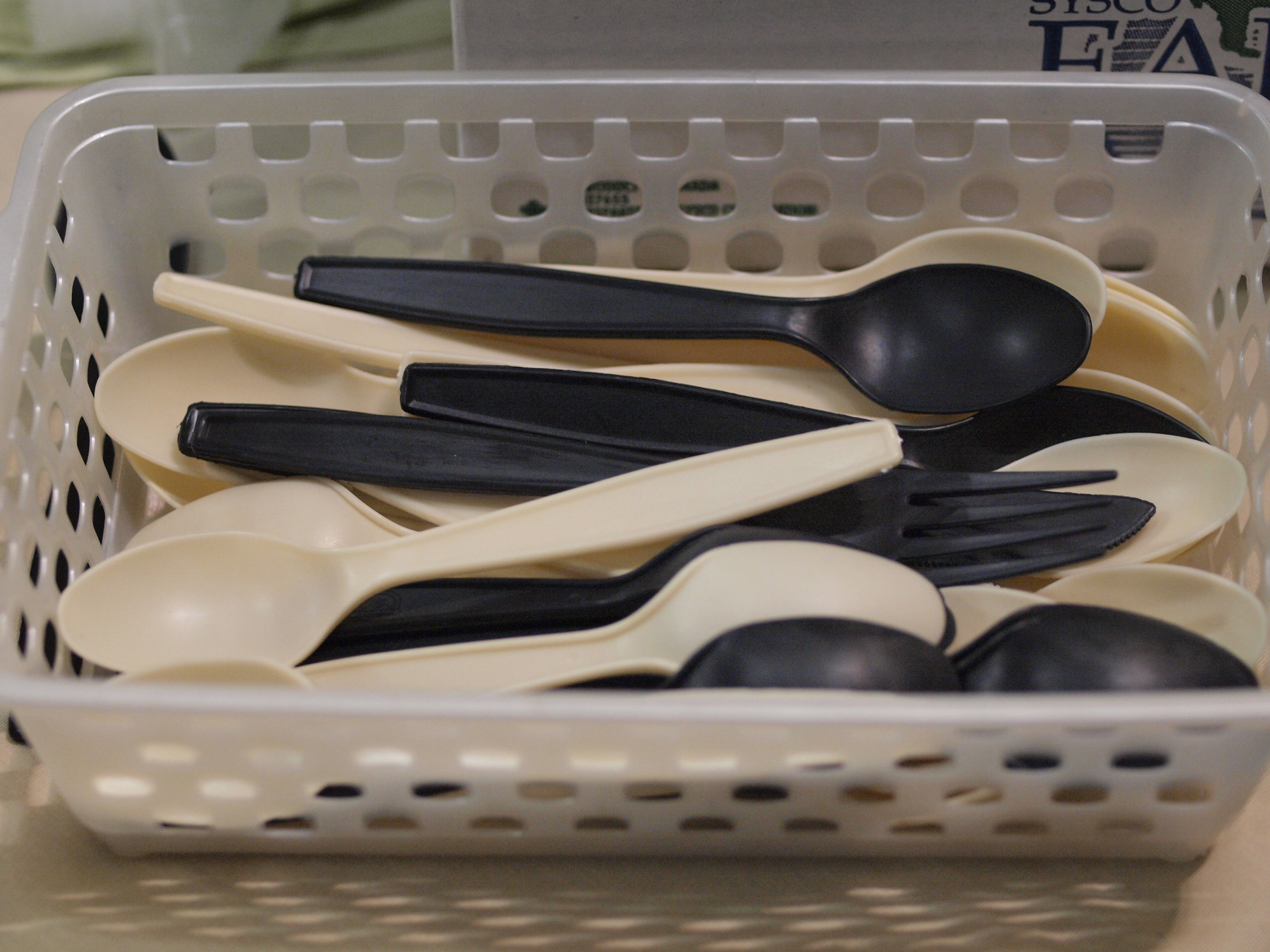 Biodegradable cutlery